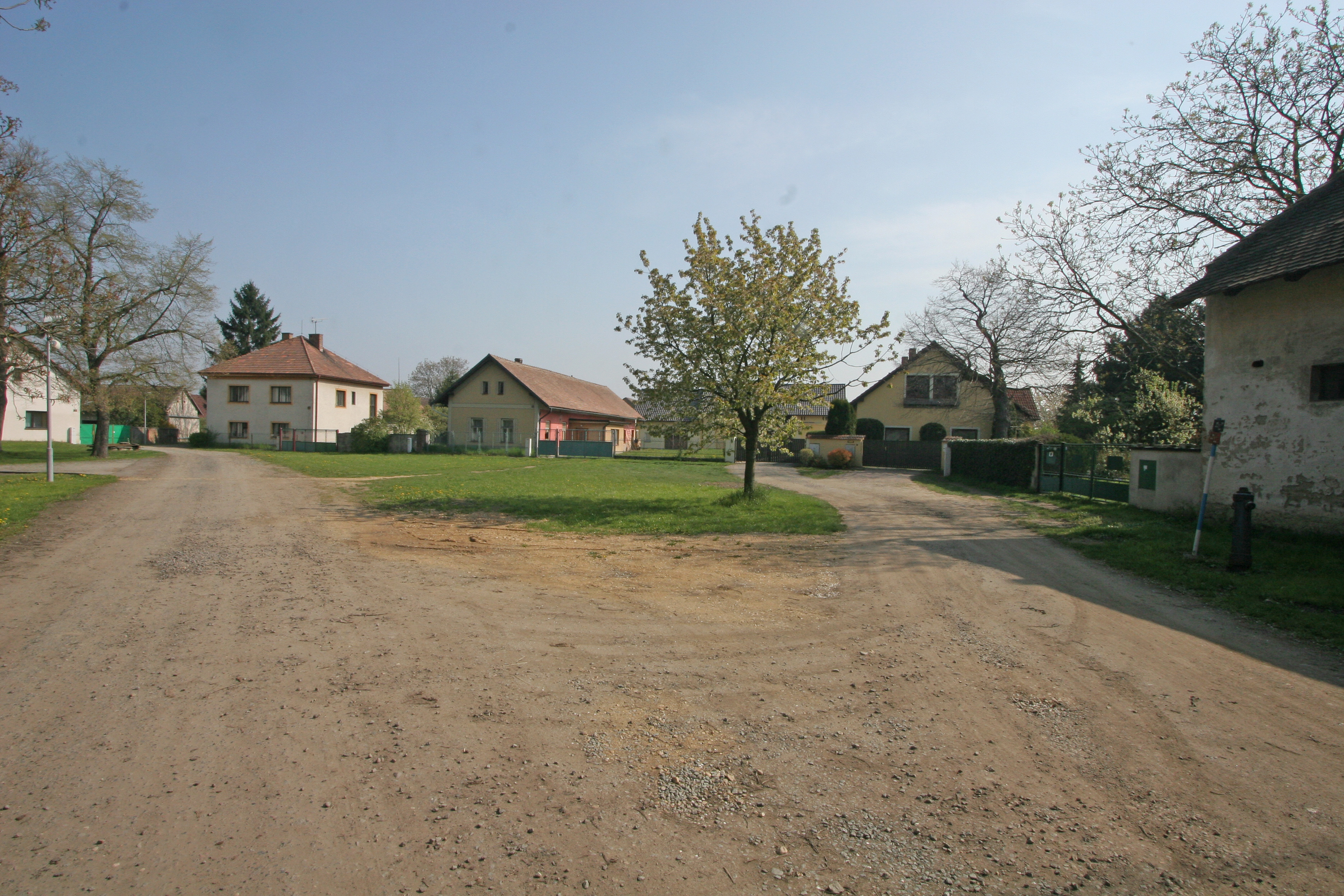 Barchov náves